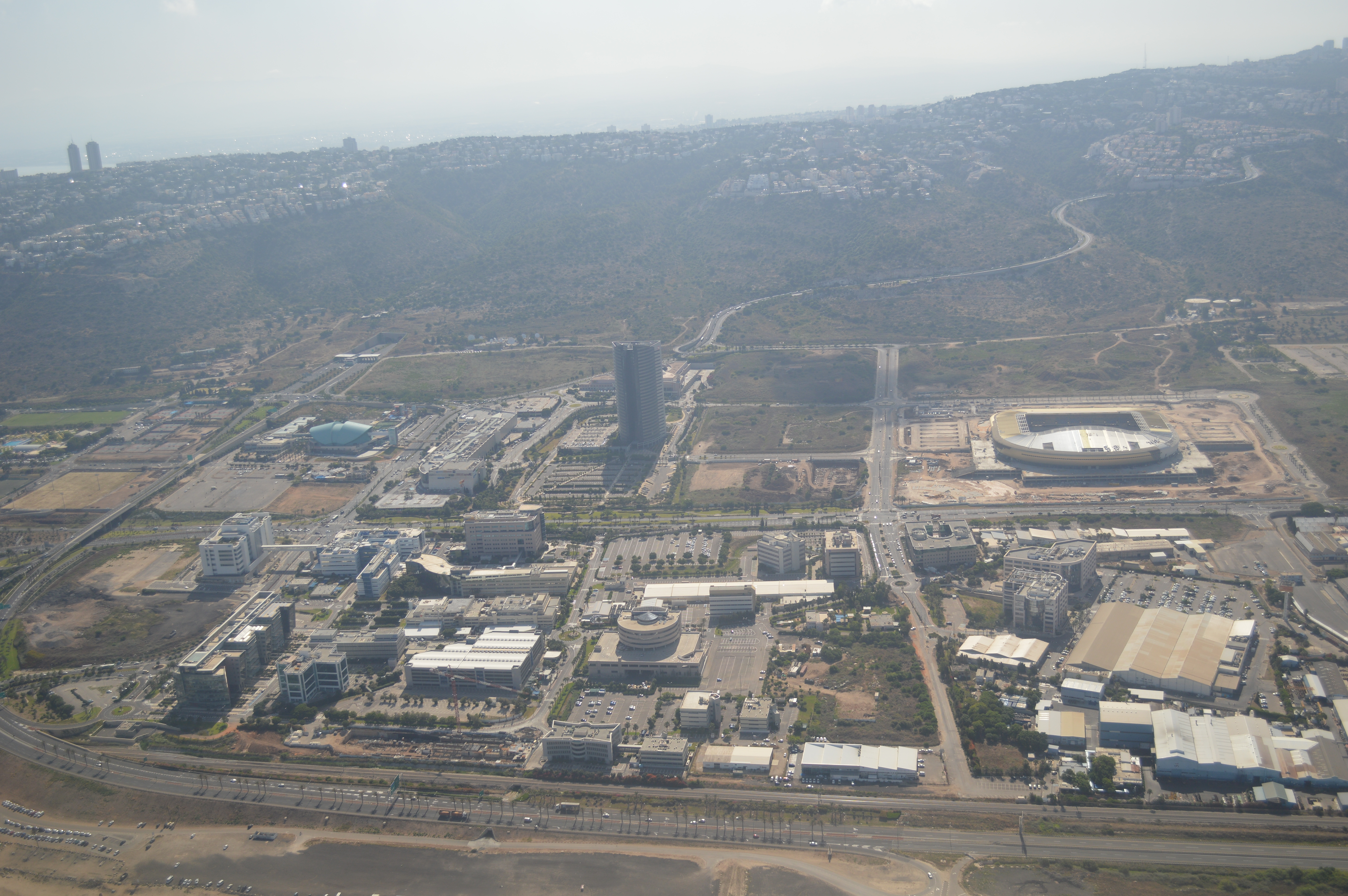 צילום אוויר של מת"ם